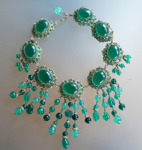 Collier de Roger Schémama pour Jean Dessès